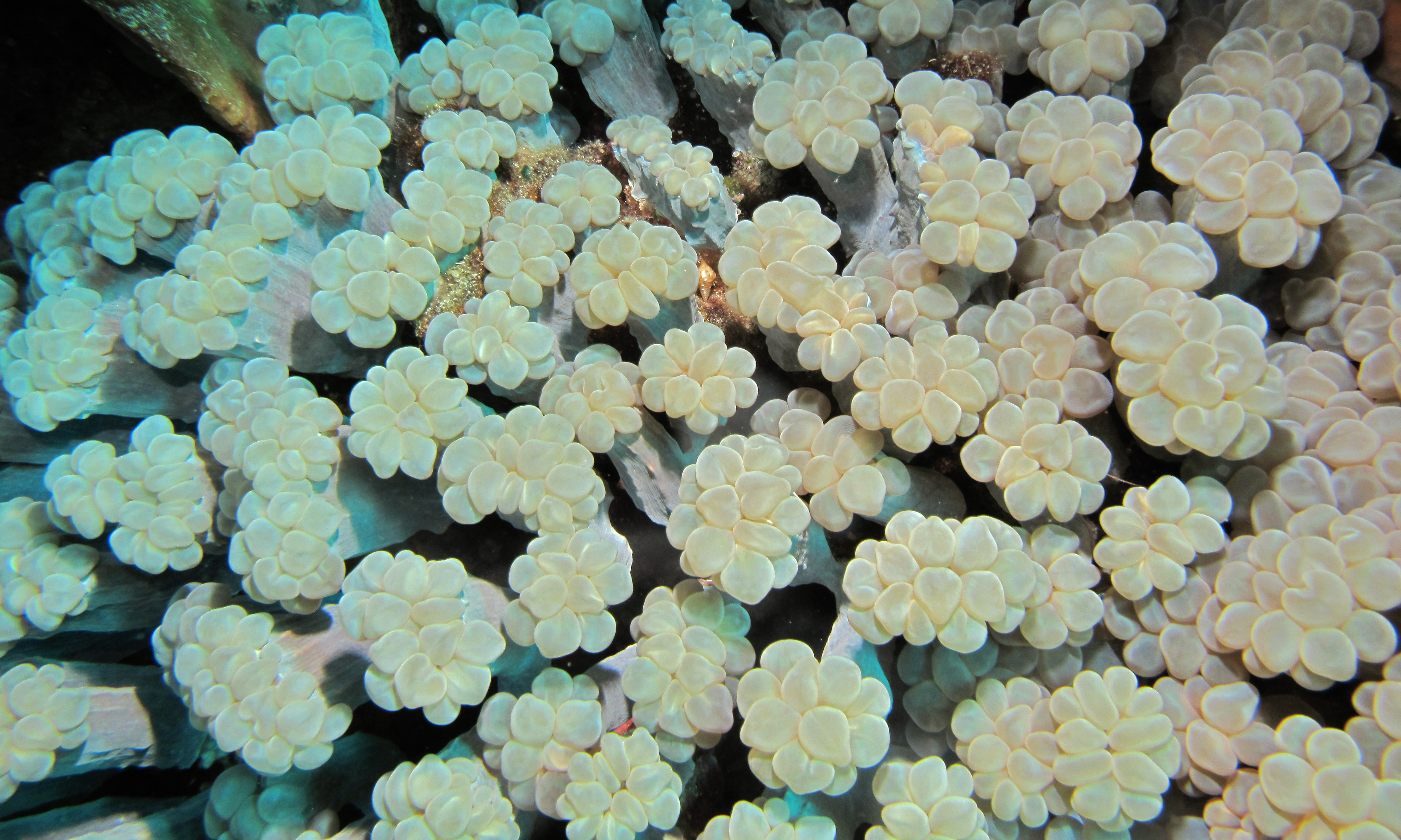 Fukui, Bunaken Island, Sulawesi, INDONESIA